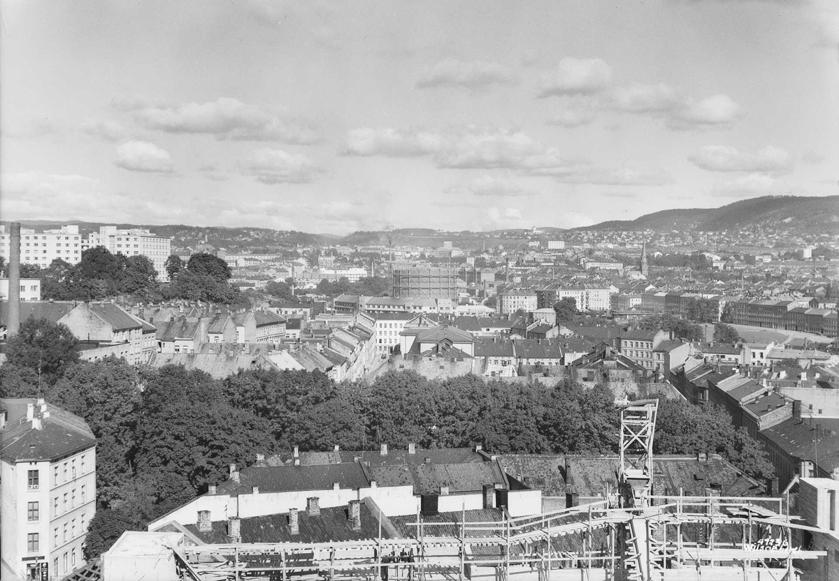 Utsikt fra Brannvakten mot Hammersborg og forbi: Krist kirkegård, bebyggelse, gateløp, bygårder. Foto: Anders Beer Wilse, ca. 1939. Fra Oslo Museums samling.